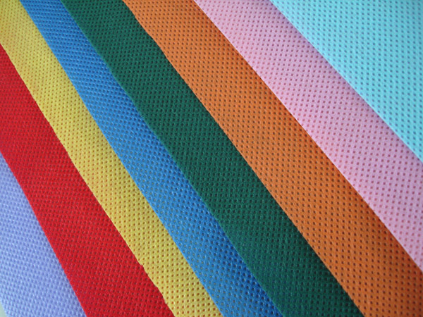 Spunbond Nonwoven tela